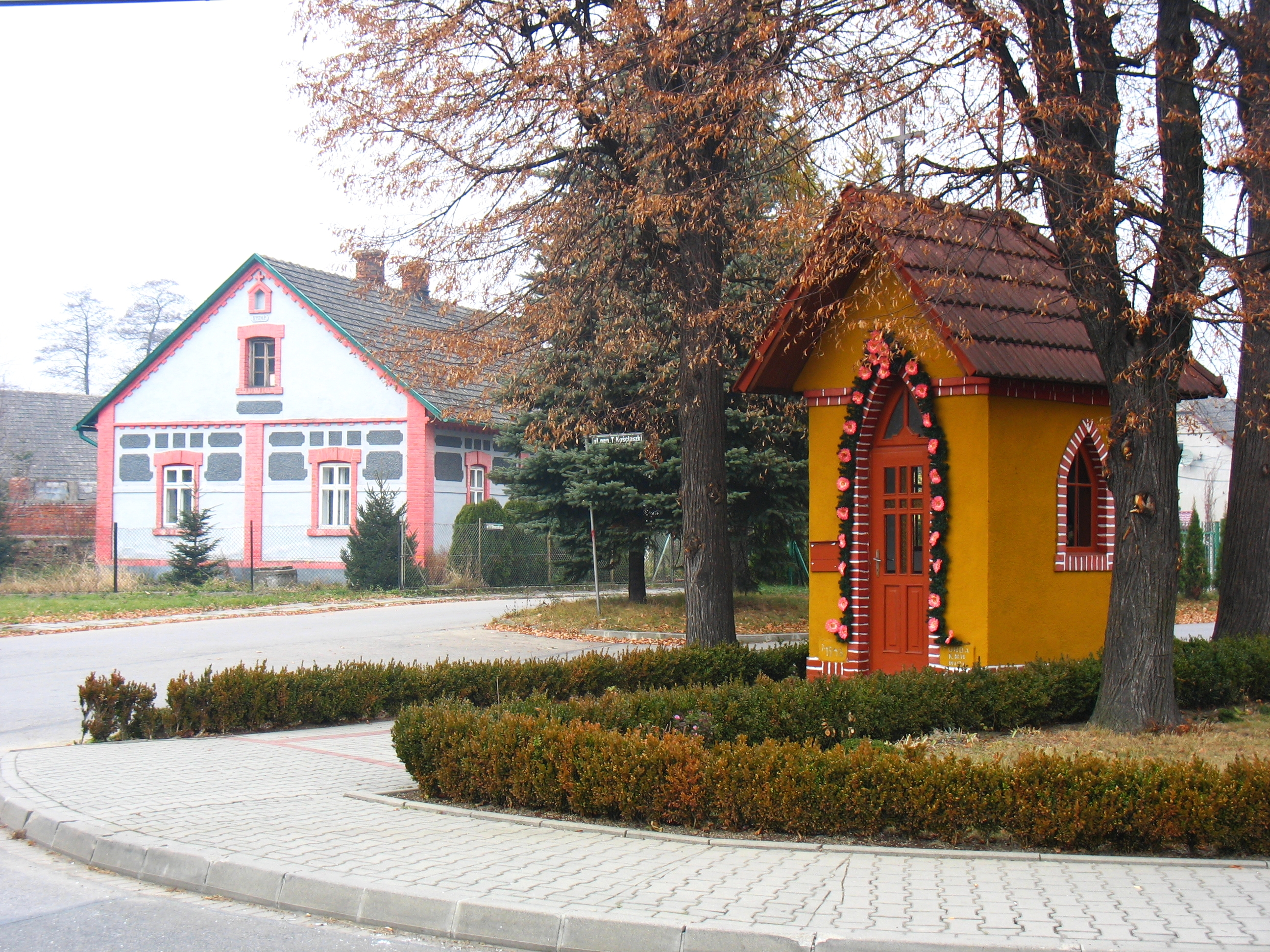 Kapliczka przy ul. św. Maksymiliana Marii Kolbego